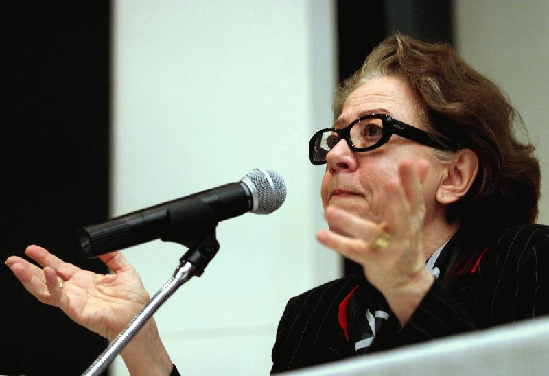 A atriz Fernanda Montenegro ministra oficina de leitura dramática na sede da Brasil Telecom (foto: Antonio Milena - ABr)